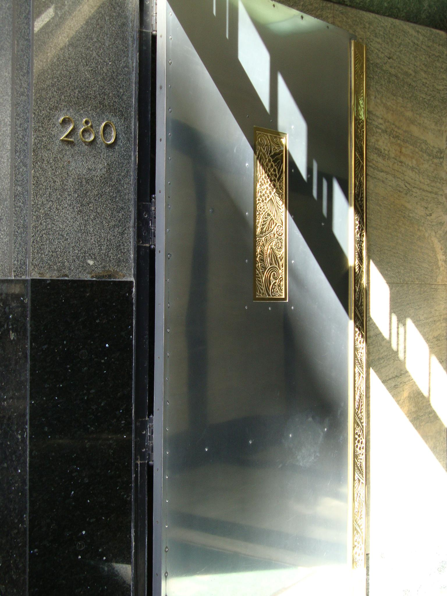 Puerta de Suipacha 280 con diseño art decó en bronce, del Edificio Dorrego (en Av. Roque Sáenz Peña entre Suipacha y Sarmiento).